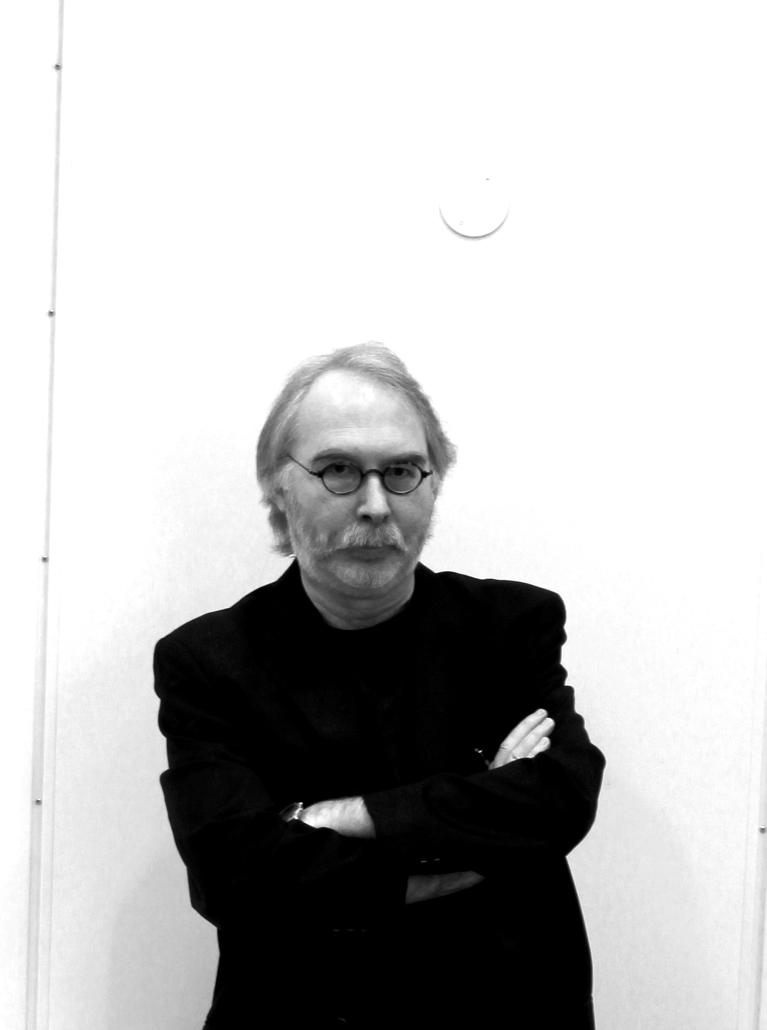 Einar O. Risa avfotografert på Garborgsenteret for Garborgs galningar (Ørjan Johansen).